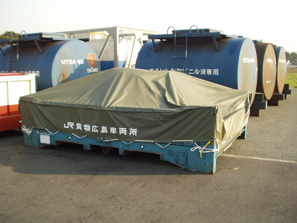 撮影地＝【大阪(タ)】